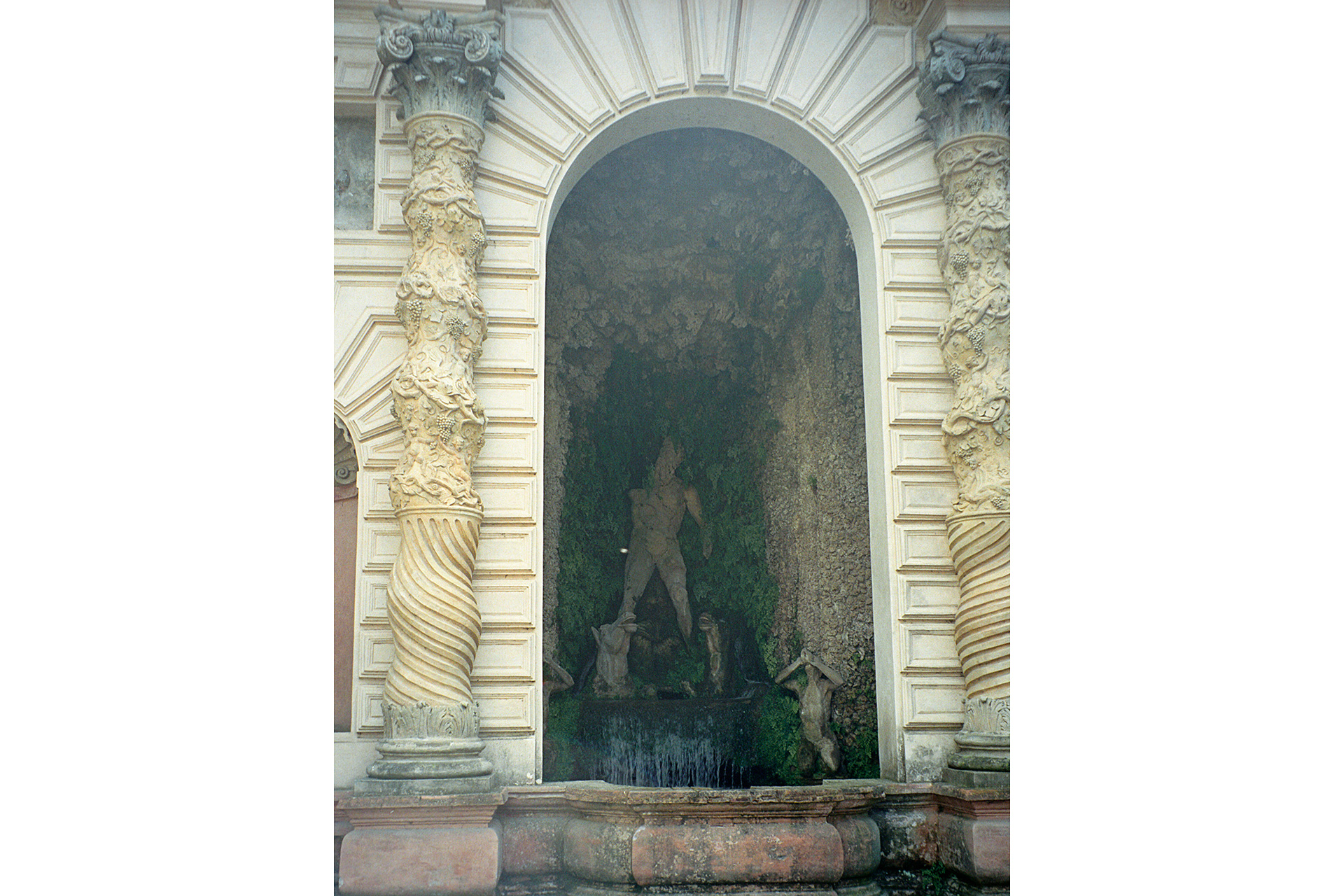 Villa d'Este, Tivoli